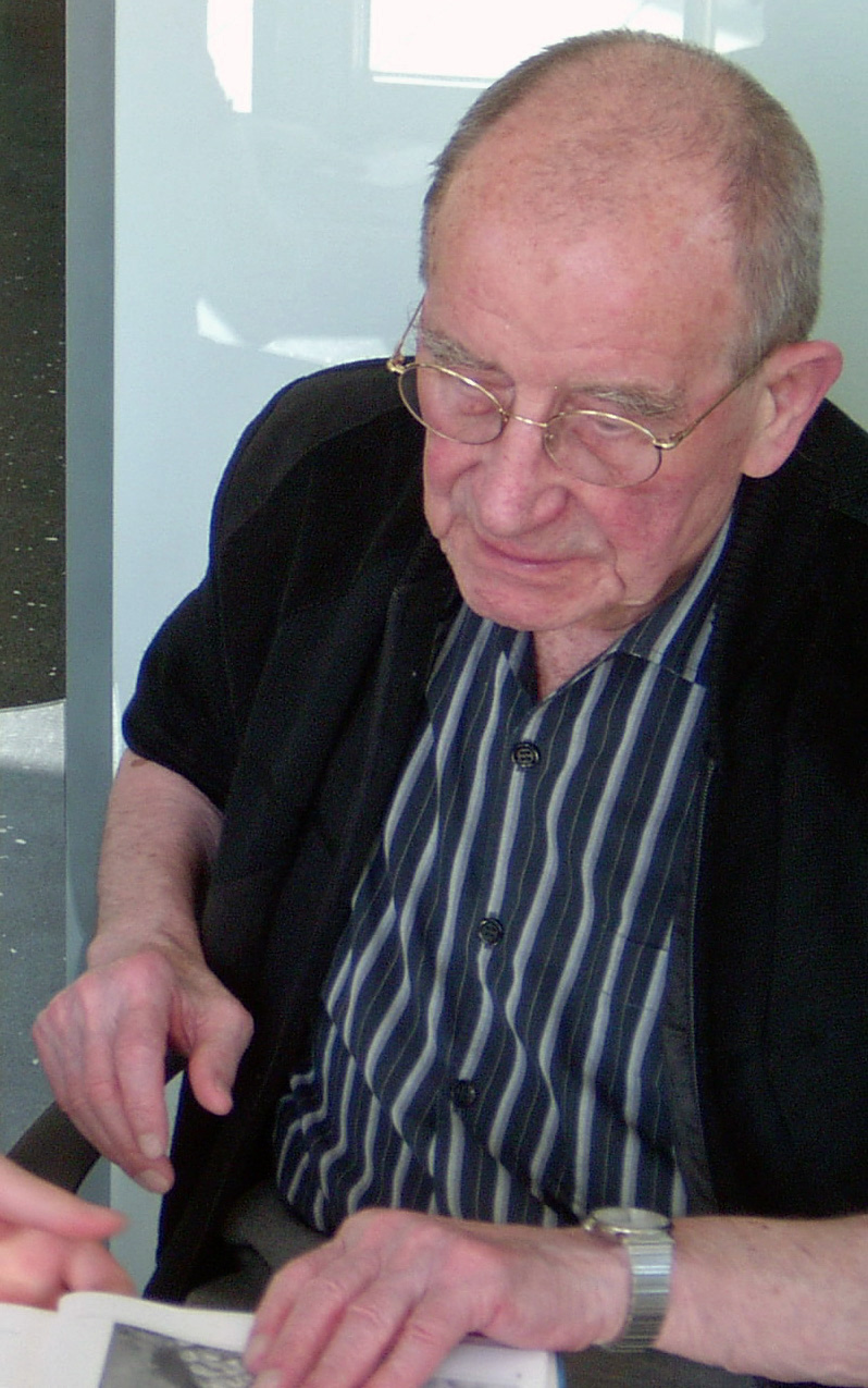 Willi Sitte im Rahmen einer Signierstunde in der Willi-Sitte-Galerie Merseburg.